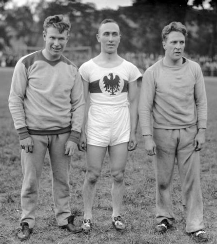 Amerikanische Leichtathleten in Berlin ! Houben, Deutschlands bester Hundert-Meter-Läufer schlägt den Amerikaner Paddock. (x) Houben Mitte mit dem Amerikaner Paddock links und Murchison rechts nach seinem Siege über Beide im Hundert-Meter-Laufen.